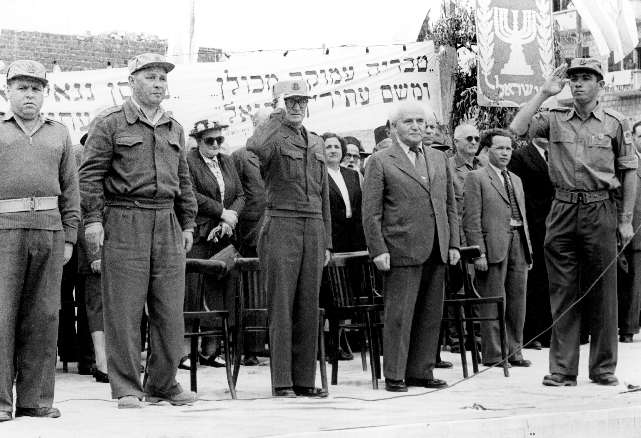 משה צחר, דוד בן-גוריון, טבריה.